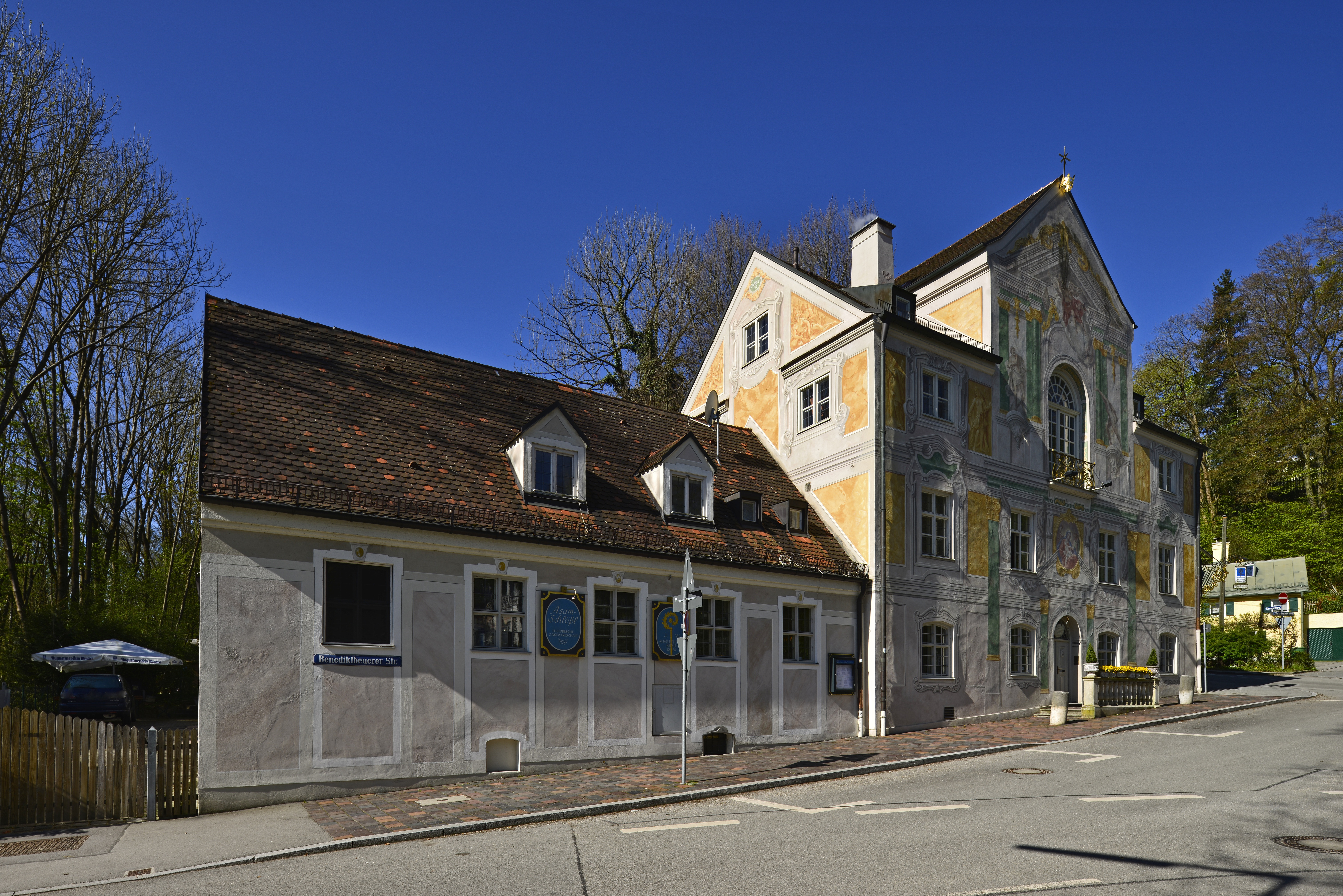 München, Thalkirchen, Maria Einsiedel, Fassadenansicht Benediktbeuererstraße, Asam Schlößl. Erwin Schleich bewohnte das Haus bis kurz vor seiner Entmündigung, krankheitsbedingt. Das Gebäude ging im Jahr 1992 in Besitz der Augustiner Brauerei über, dessen Leiter, einer der besten Freunde von Schleich war.